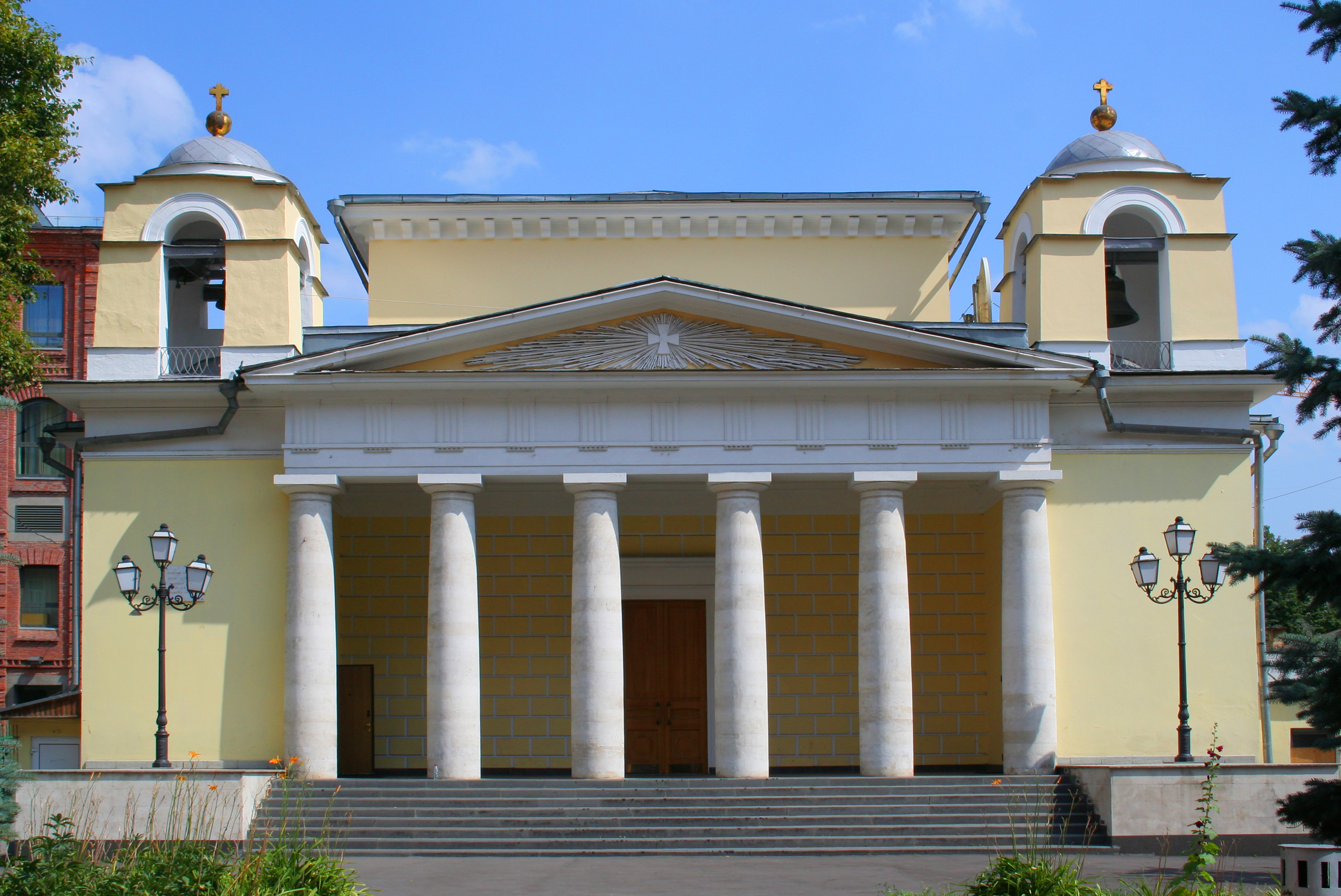 Kirche des Hl. Ludwig von Frankreich in Moskau